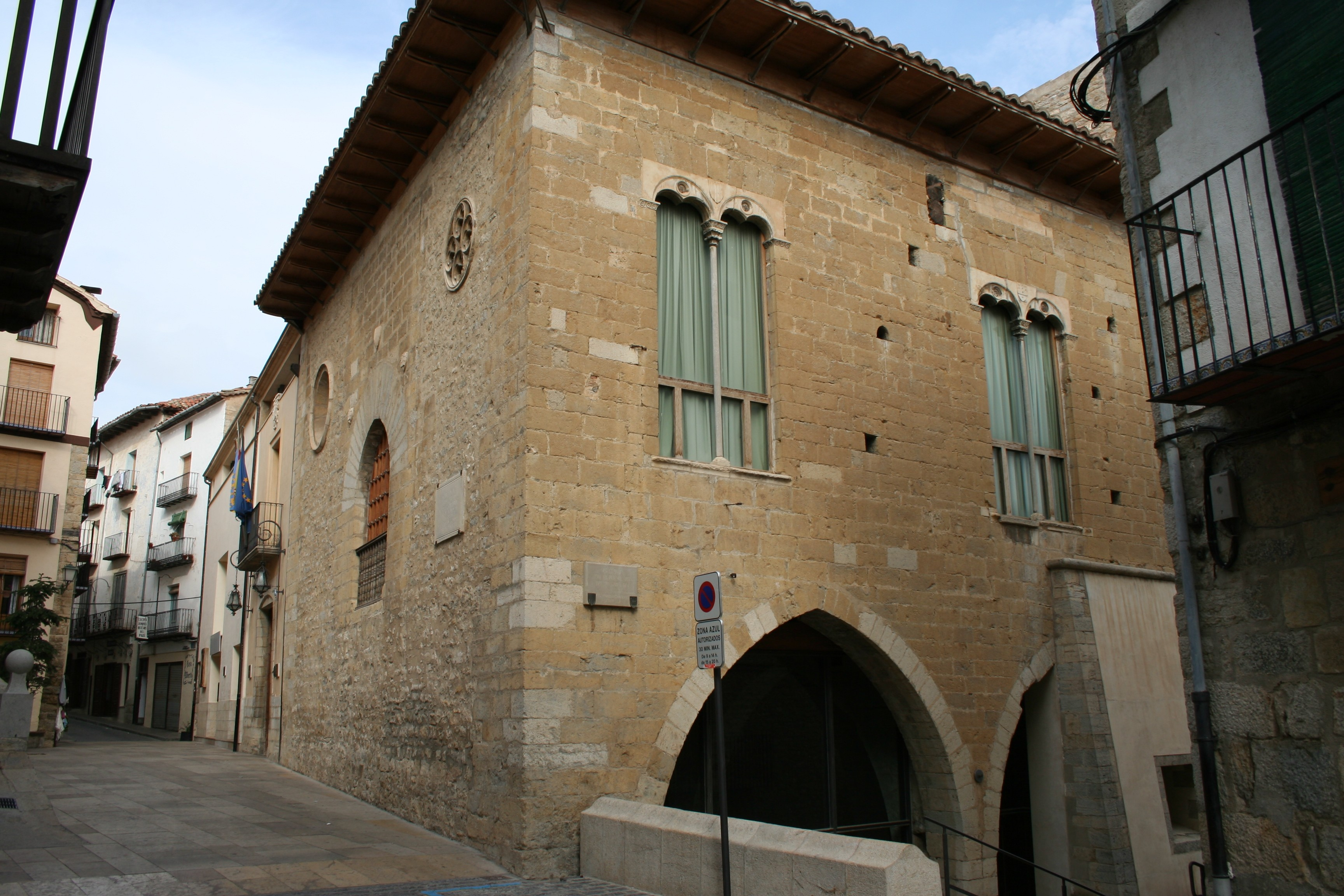 Morella: Casa del ayuntamiento. Siglo XV.